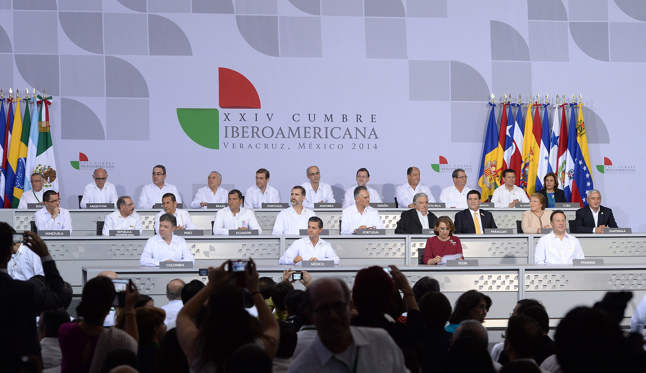 Gobierno de Chile